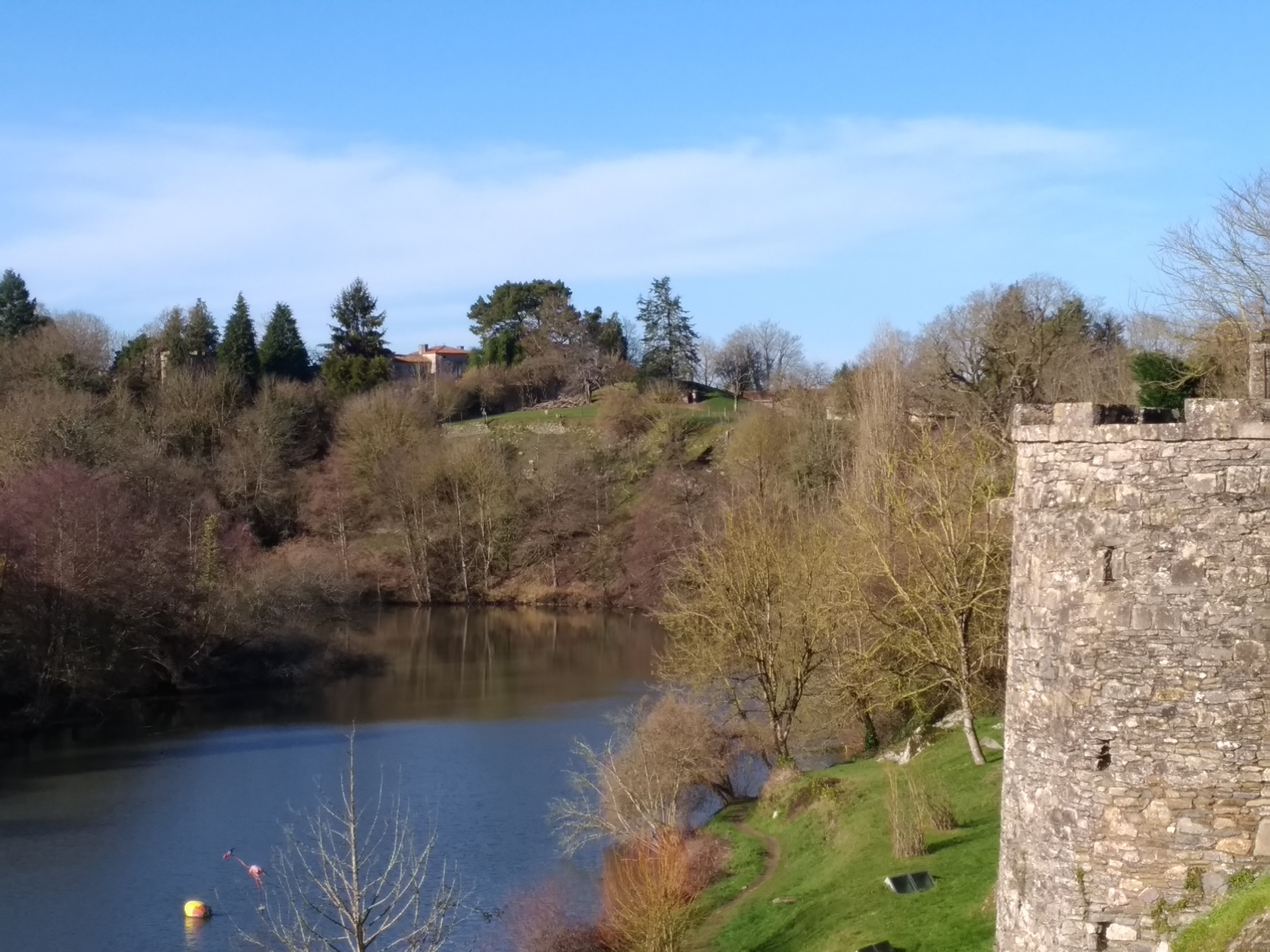 Motte castrale du Château-Neuf située à Vouvant. Cette motte fait plus de 2 mètres de hauteur pour environ 20 mètres de circonférence. Photographie prise depuis le haut de la Porte (ou Poterne) Saint-Louis.